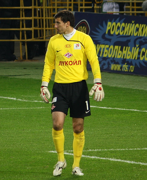 Soslan Djanaev